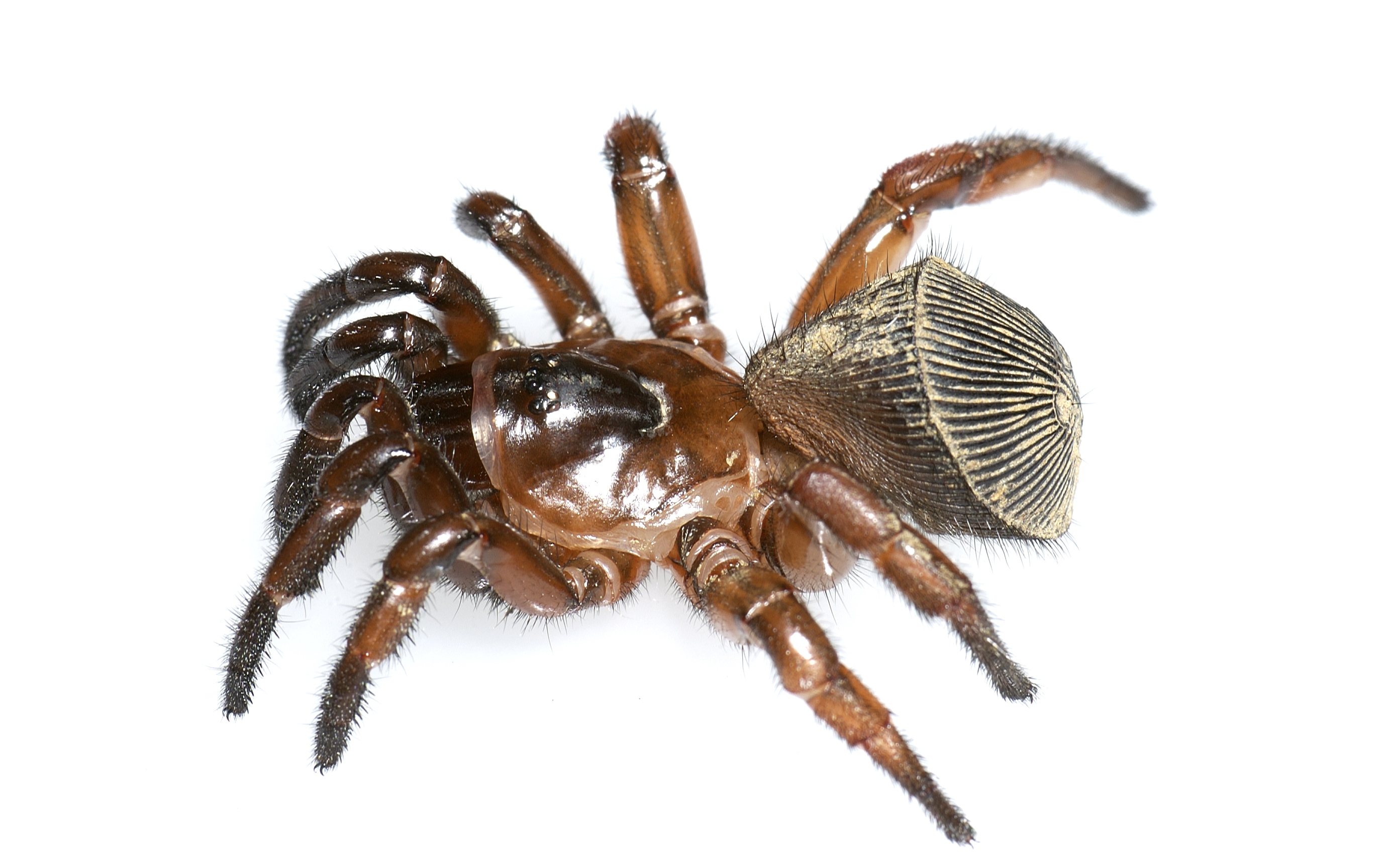 Female Cyclocosmia truncata